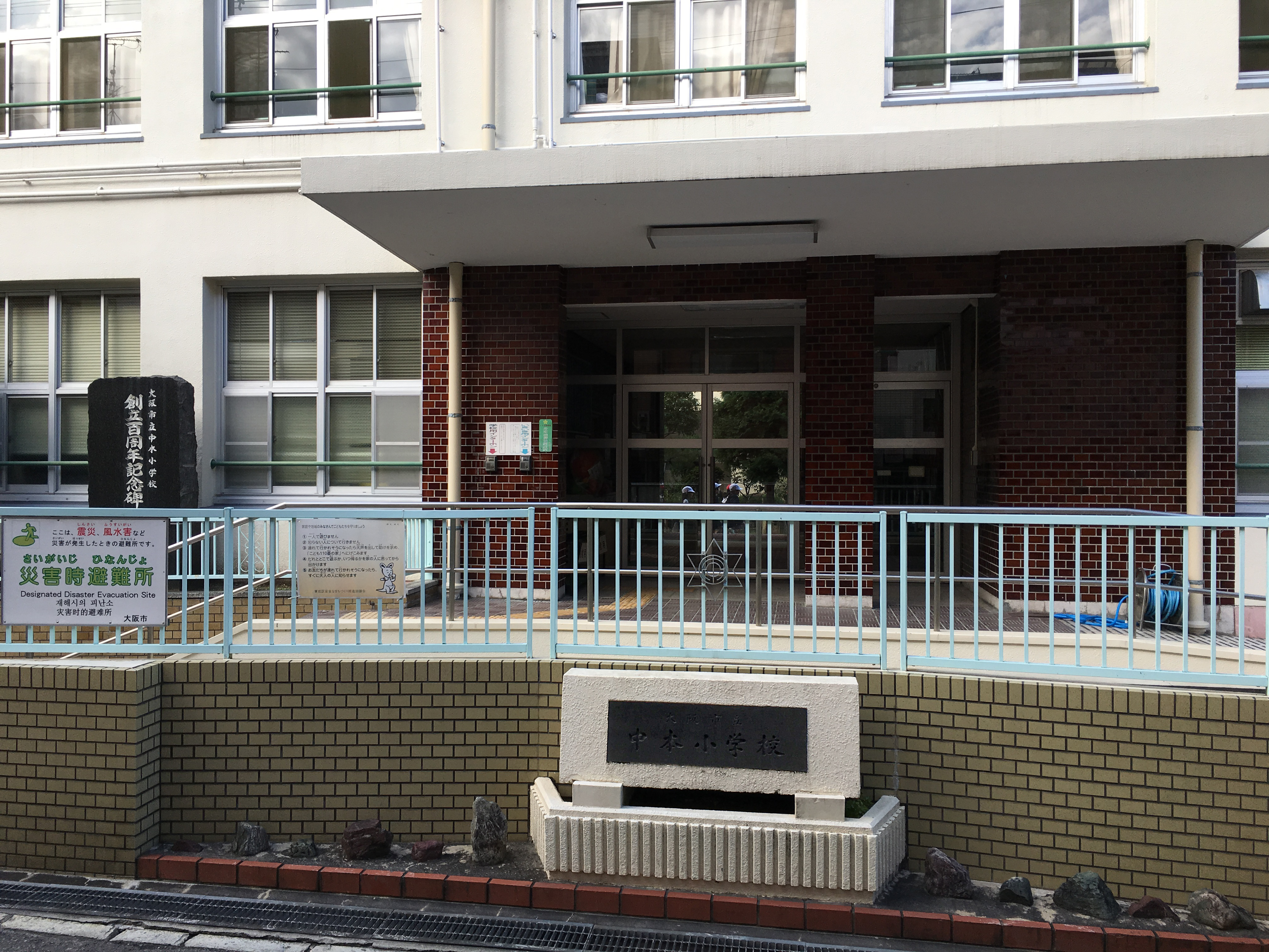 大阪市立中本小学校